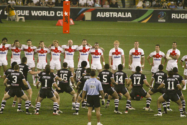 New Zealand Haka